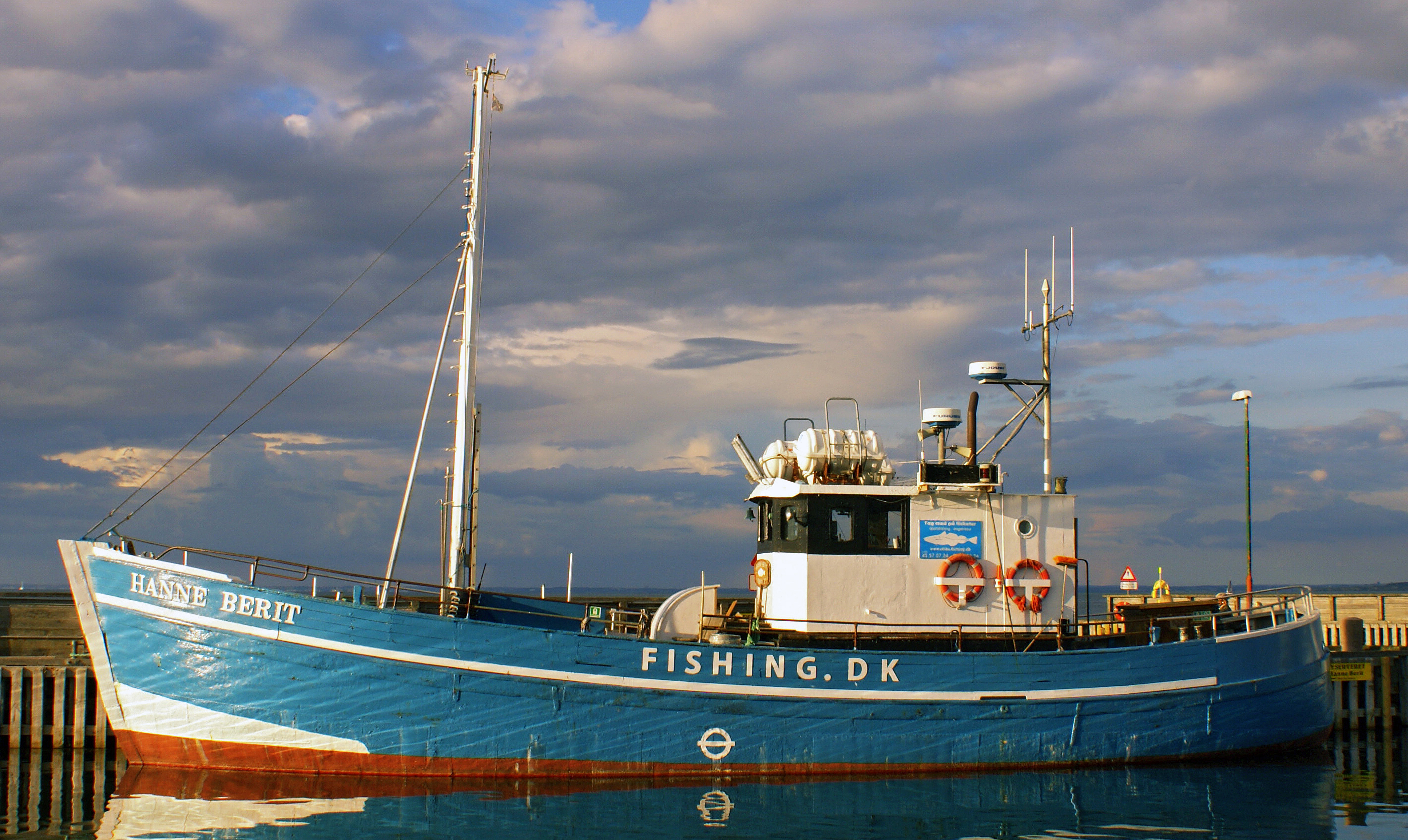 Fischkutter Hanne Berit (DK)